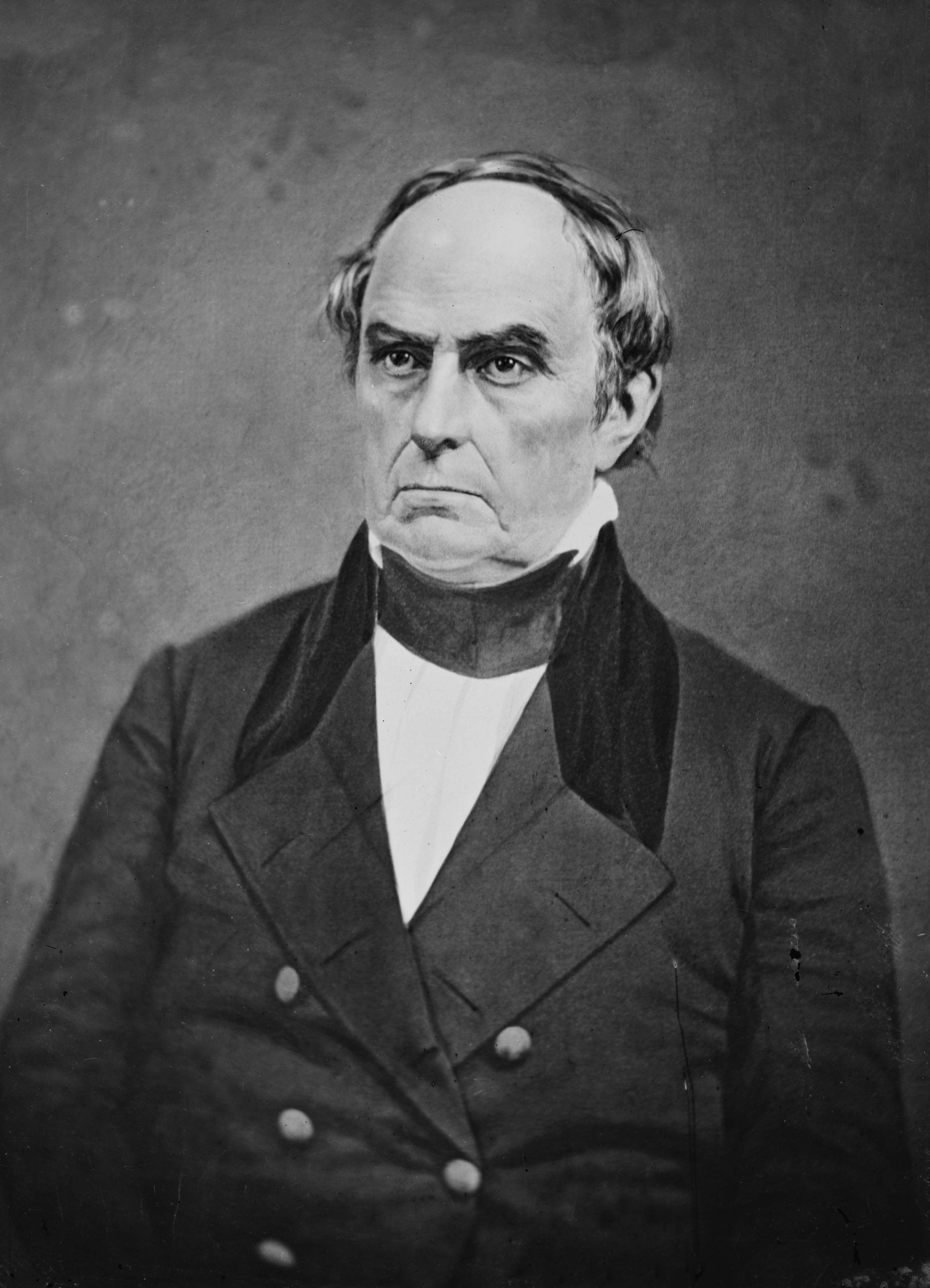 Daniel Webster (1782-1852), US-american politician / US-amerikanischer Politiker